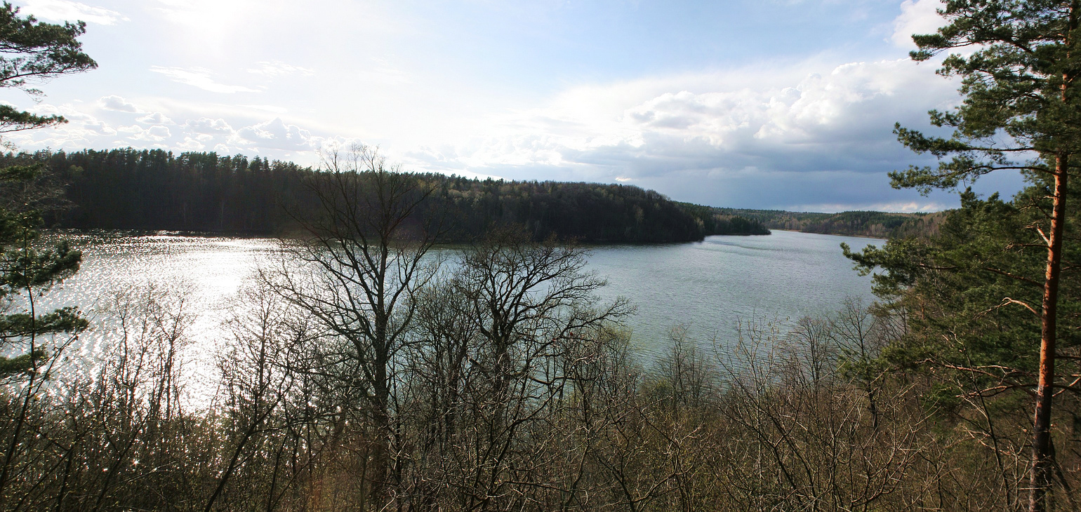 Balsys Lake, Vilnius